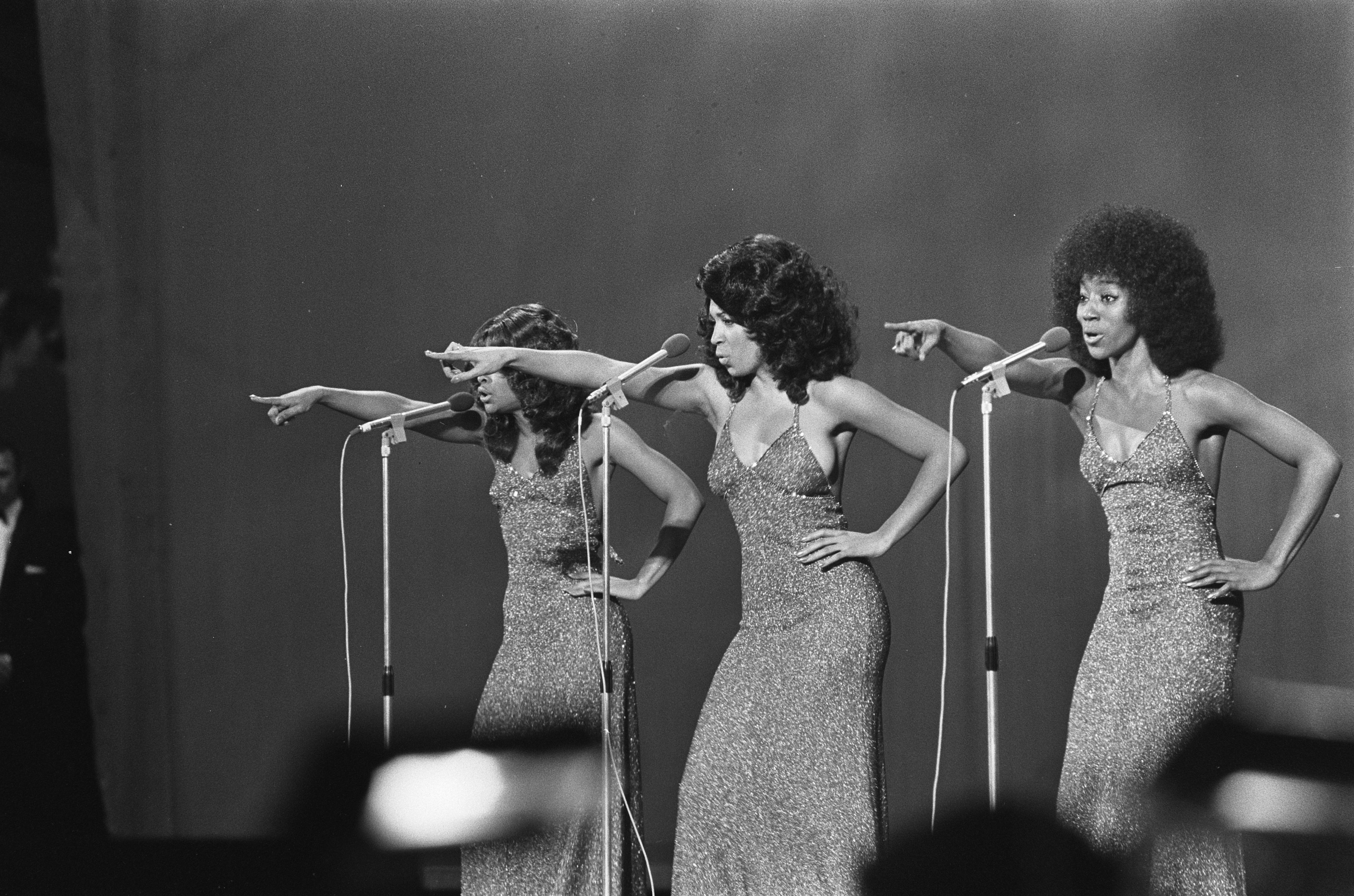 The Three Degrees tijdens het Grand Gala du Disque Populaire 1974